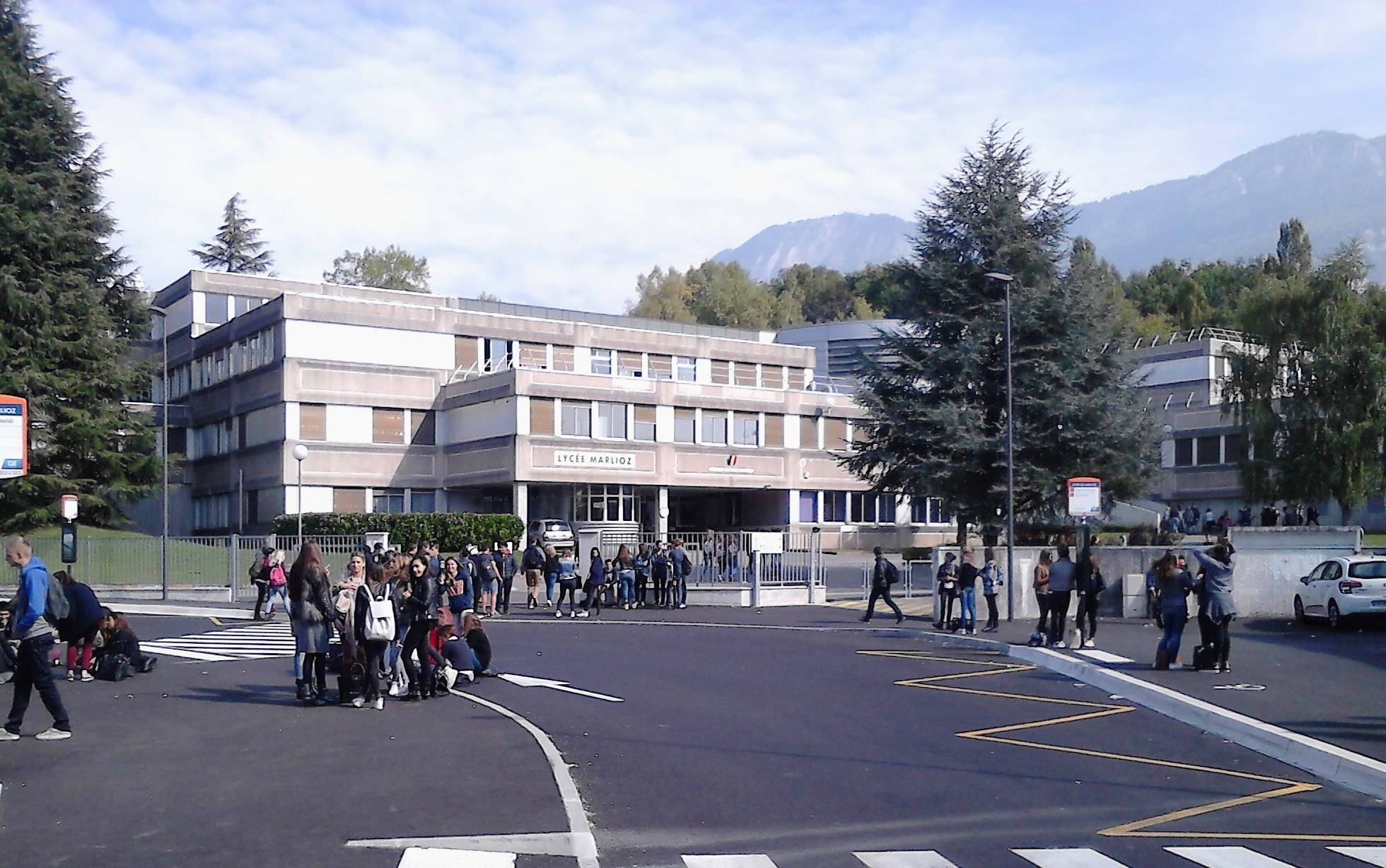 Vue de l'entrée du lycée polyvalent Marlioz d'Aix-les-Bains.